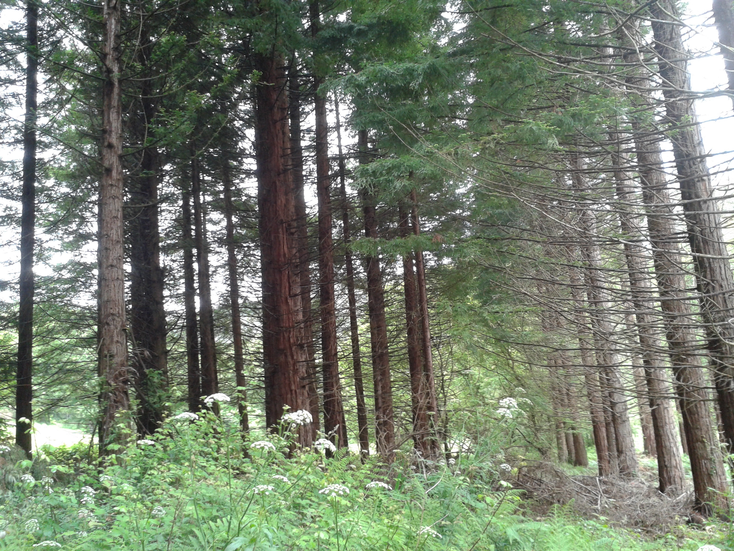 Plantación experimental de sequoia sempervirens en Fontao, Foz. Vense a tona avermellada características.